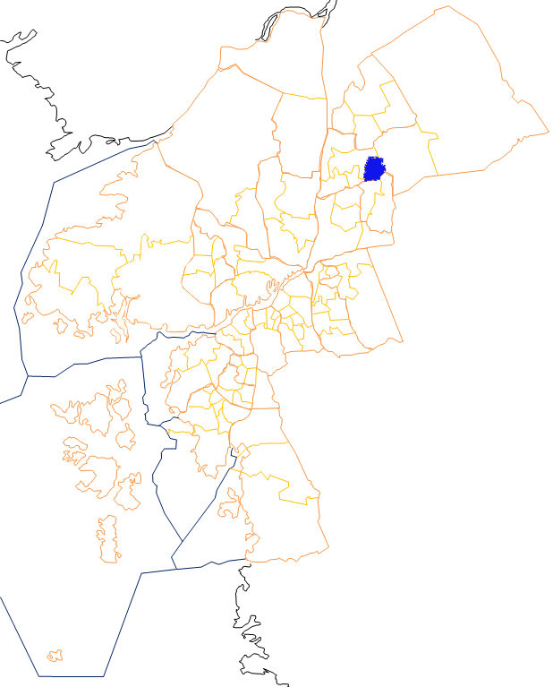 Karta som visar primärområdes belägenhet i Göteborg